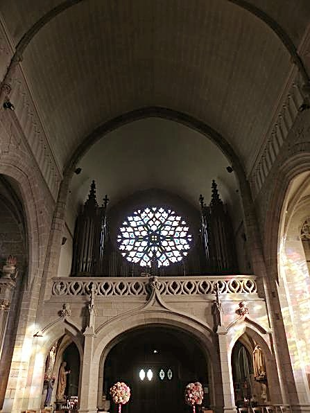 Grandes-Orgues Debierre de l'Église Saint-Léonard de Fougères (35).